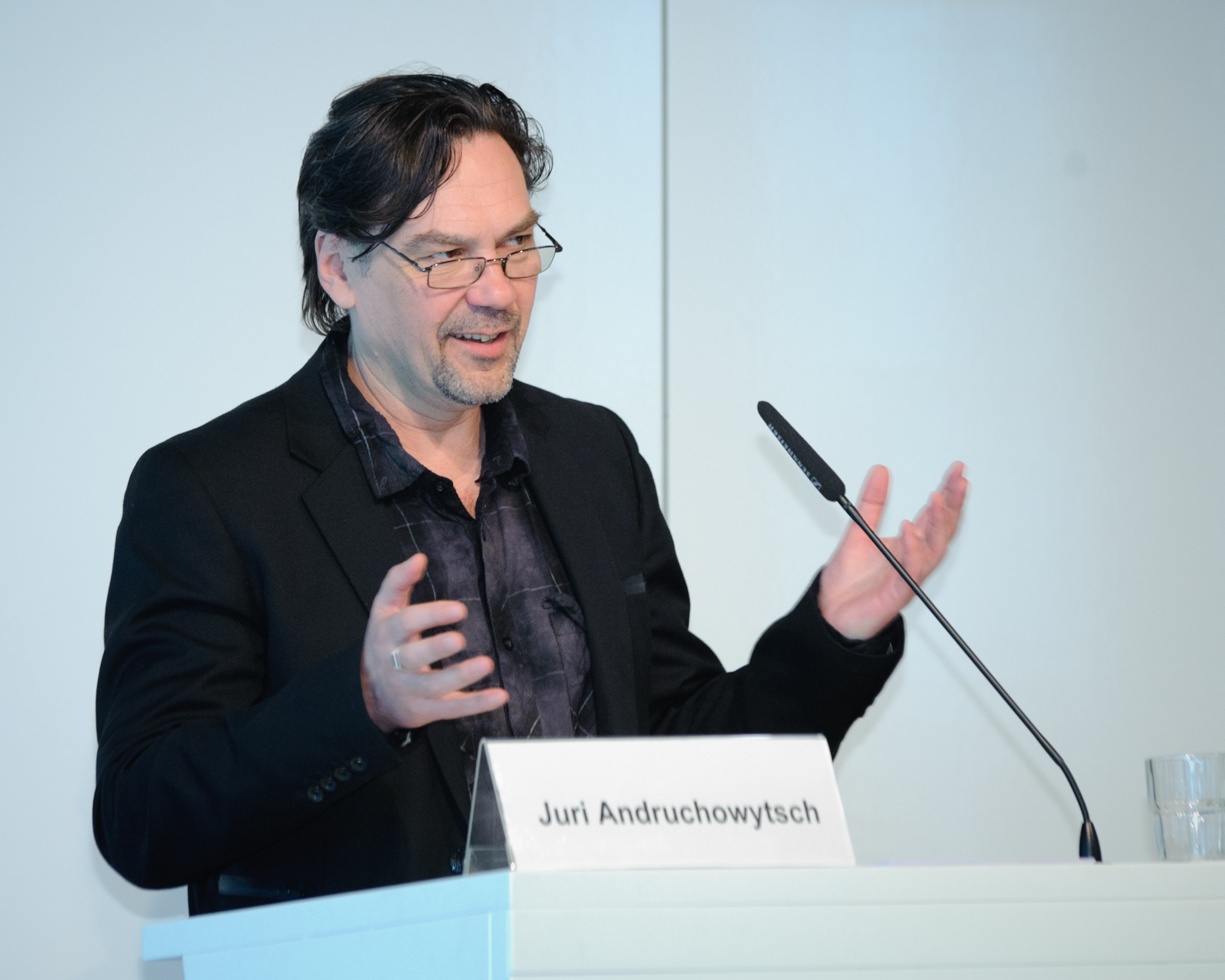 Yuri Andrukhovych, Schriftsteller Foto: Stephan Röhl